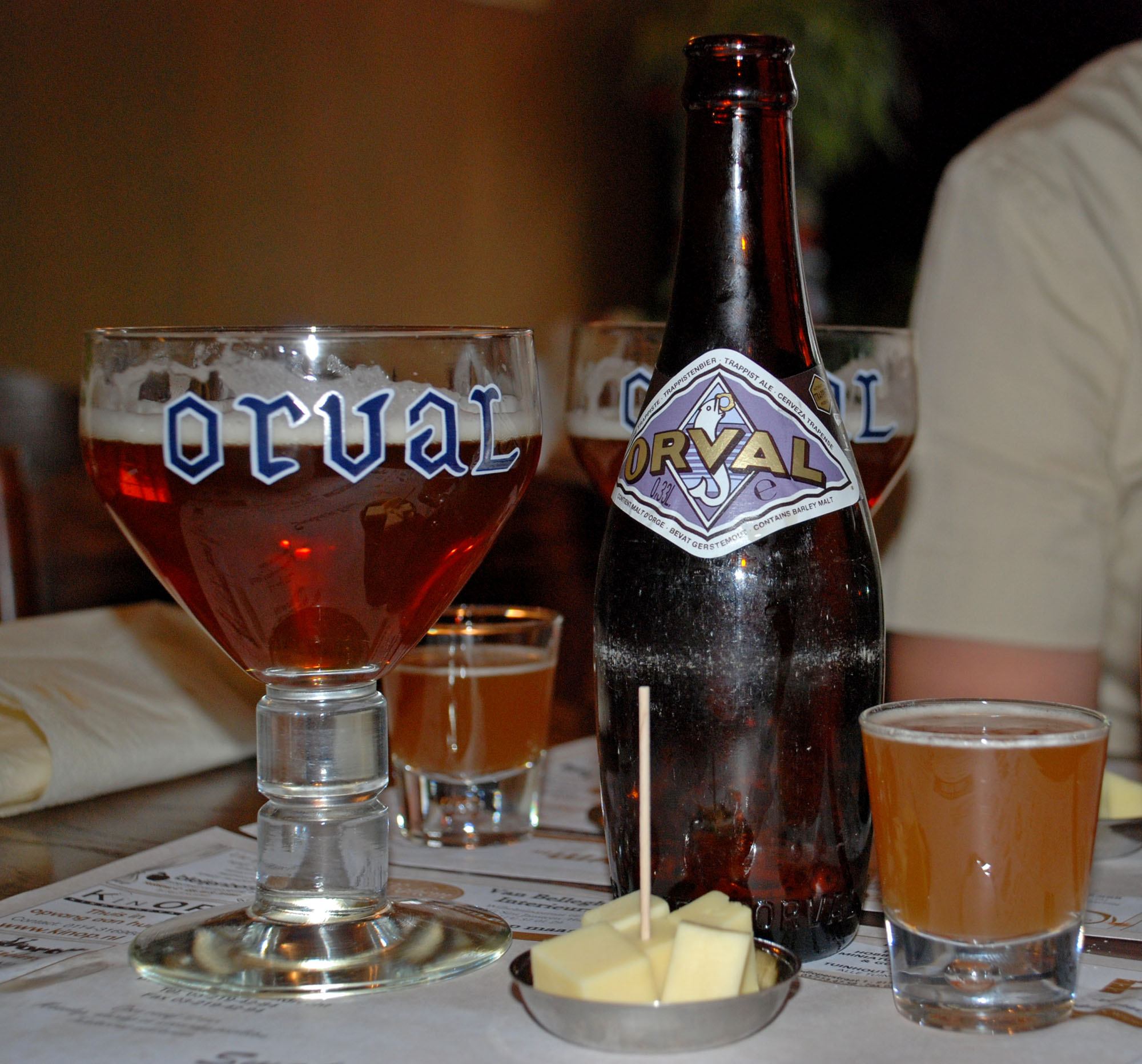 Orval + 6 maand oud